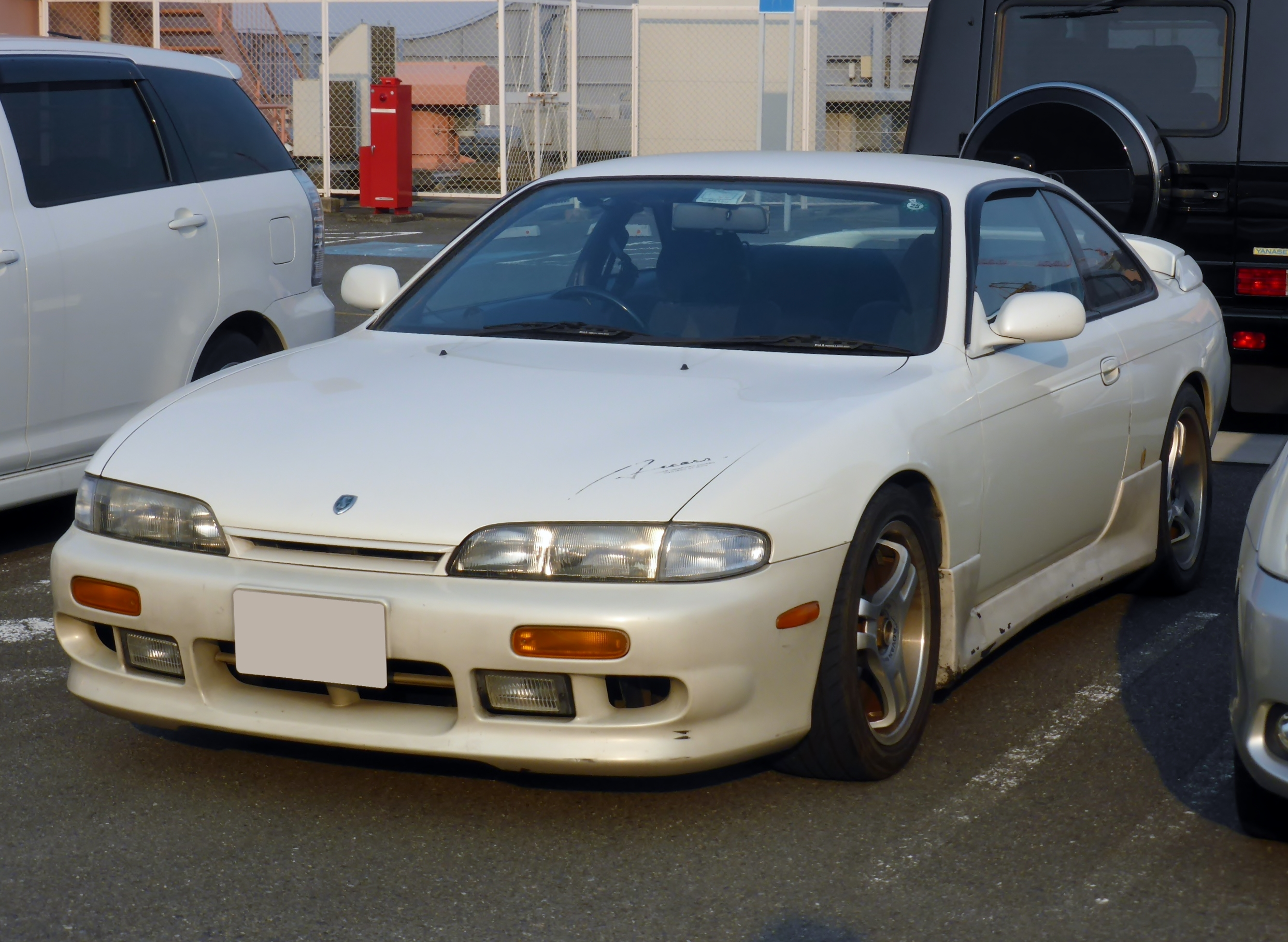 チューニングされたS14前期型日産・シルビアQ'sをフロントから撮影。